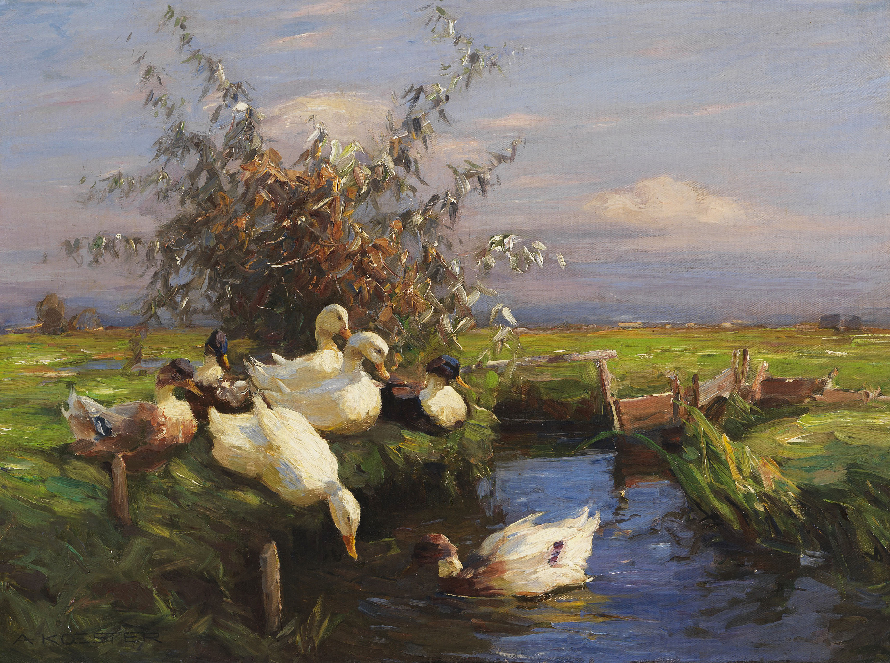 Sieben Enten am Graben. Ca. 1900-1905. Öl auf Leinwand. Stein 607. Links unten signiert. 46,5 x 62 cm